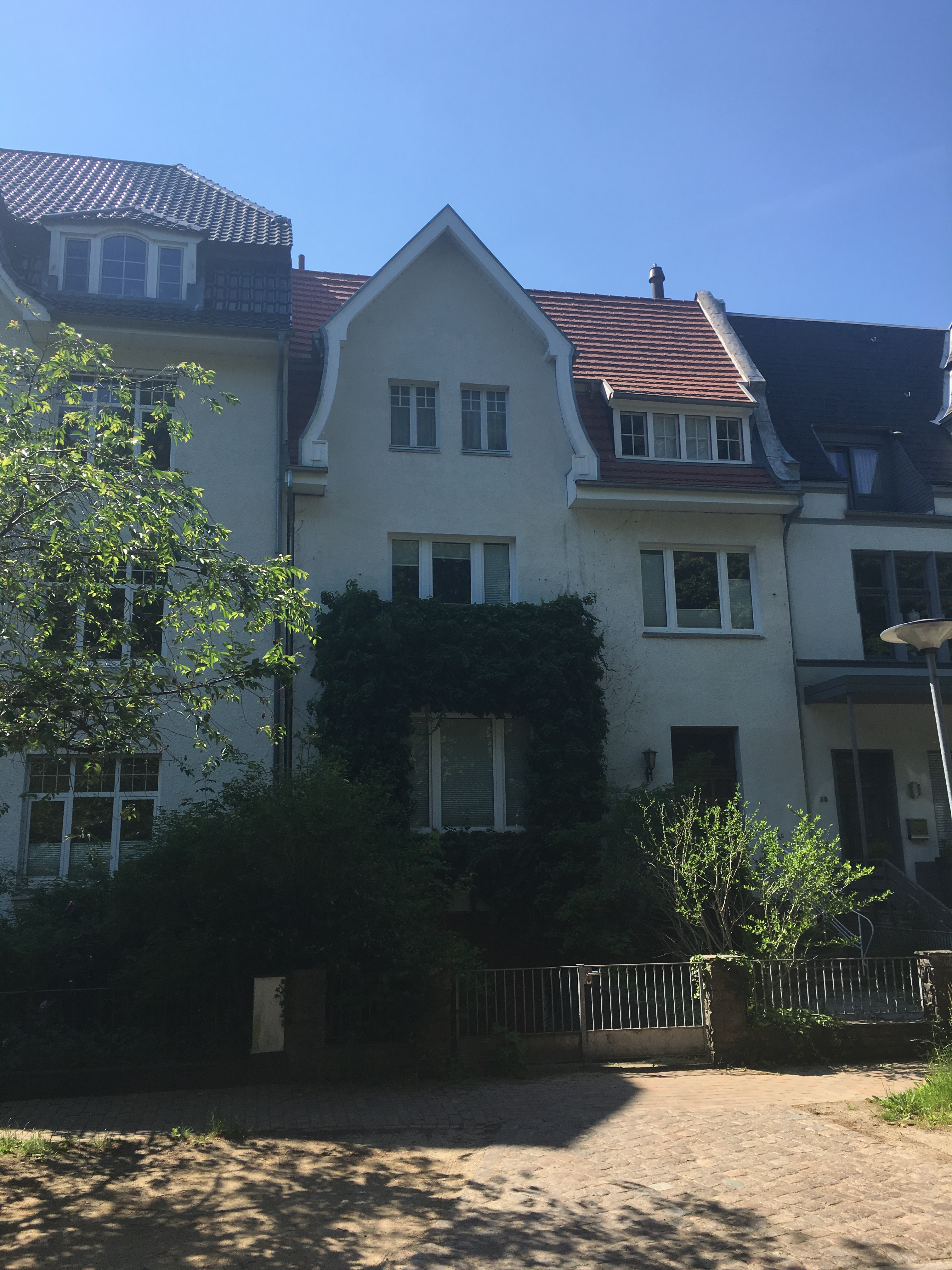 Im Haus Parkstraße 60 in Lübeck. Hier wohnte in der ersten Hälfte des 20. Jahrhunderts die Pianistin Lilli Dieckmann.